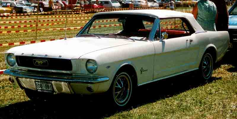 Ford Mustang